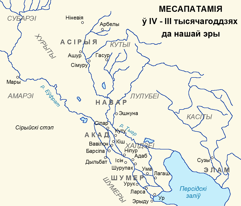 Карта Месапатаміі і Элама ў 4 - 3 тысячагоддзях да нашай эры